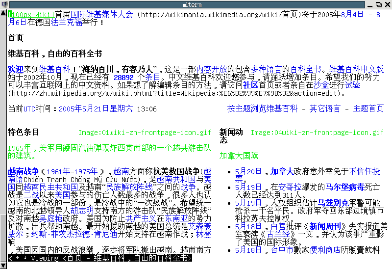 浏览器w3m访问维基百科。